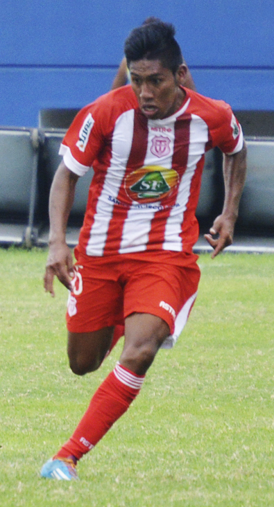 Bryan Oña jugando para Técnico Universitario en el 2014